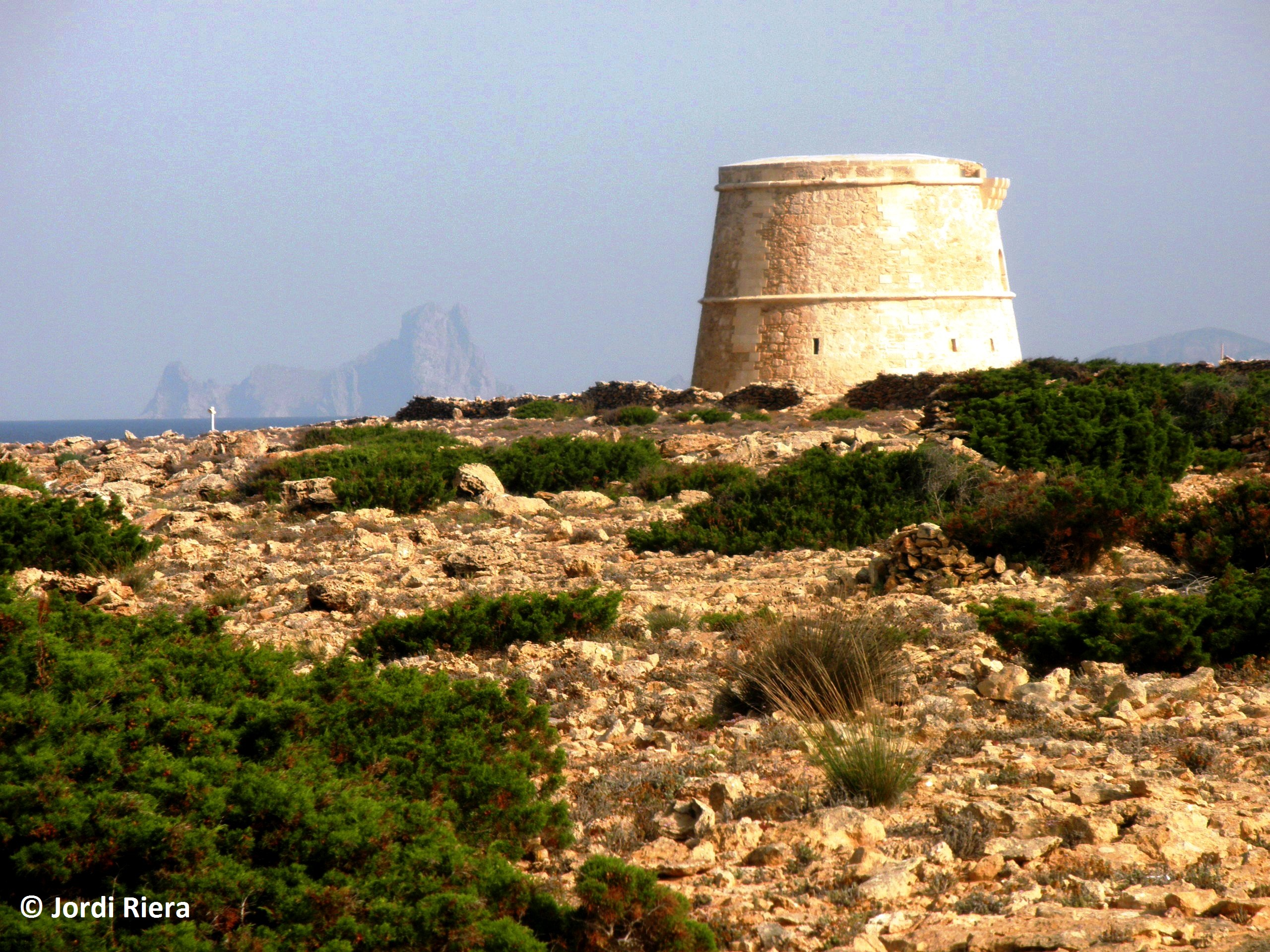 Punta de la Gavina amb es Vedrà a l'horitzó. Antiga vénda de sa torre de la Gavina, actualment: Portossalè